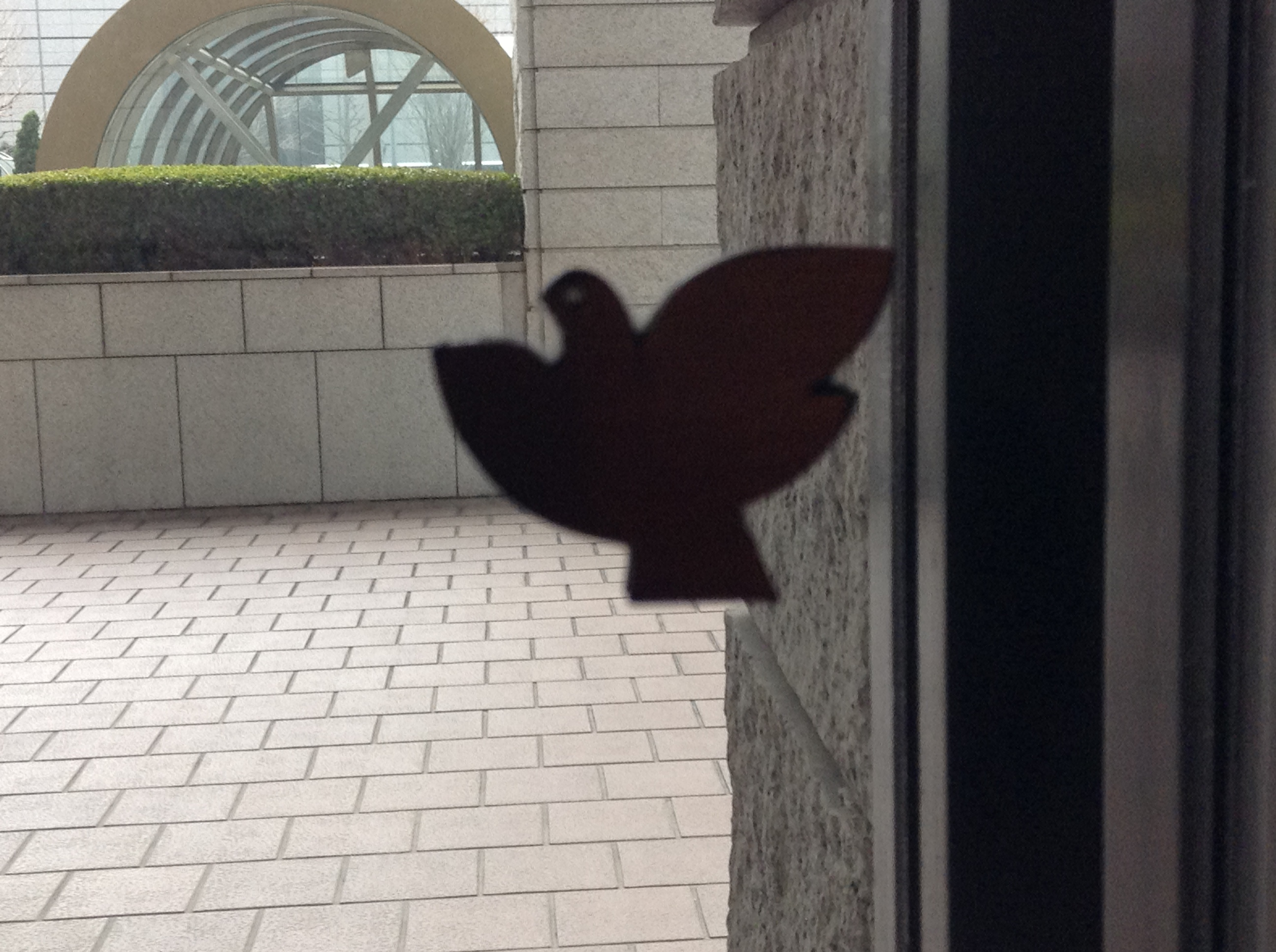 三菱銀行時代後期のバードマーク